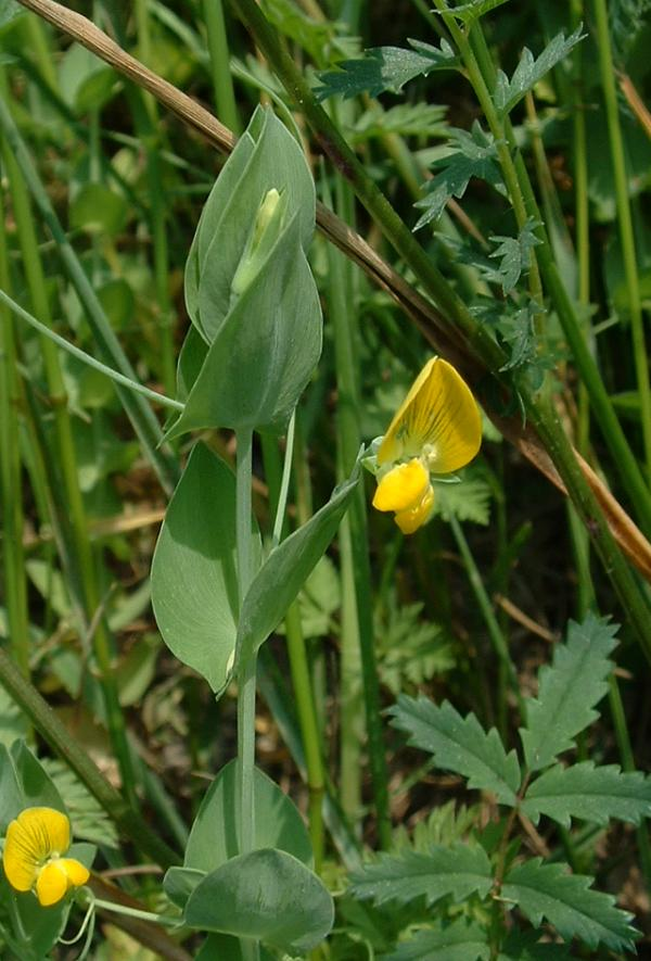 Gesse aphaca, Vellefrey-et-Vellefrange